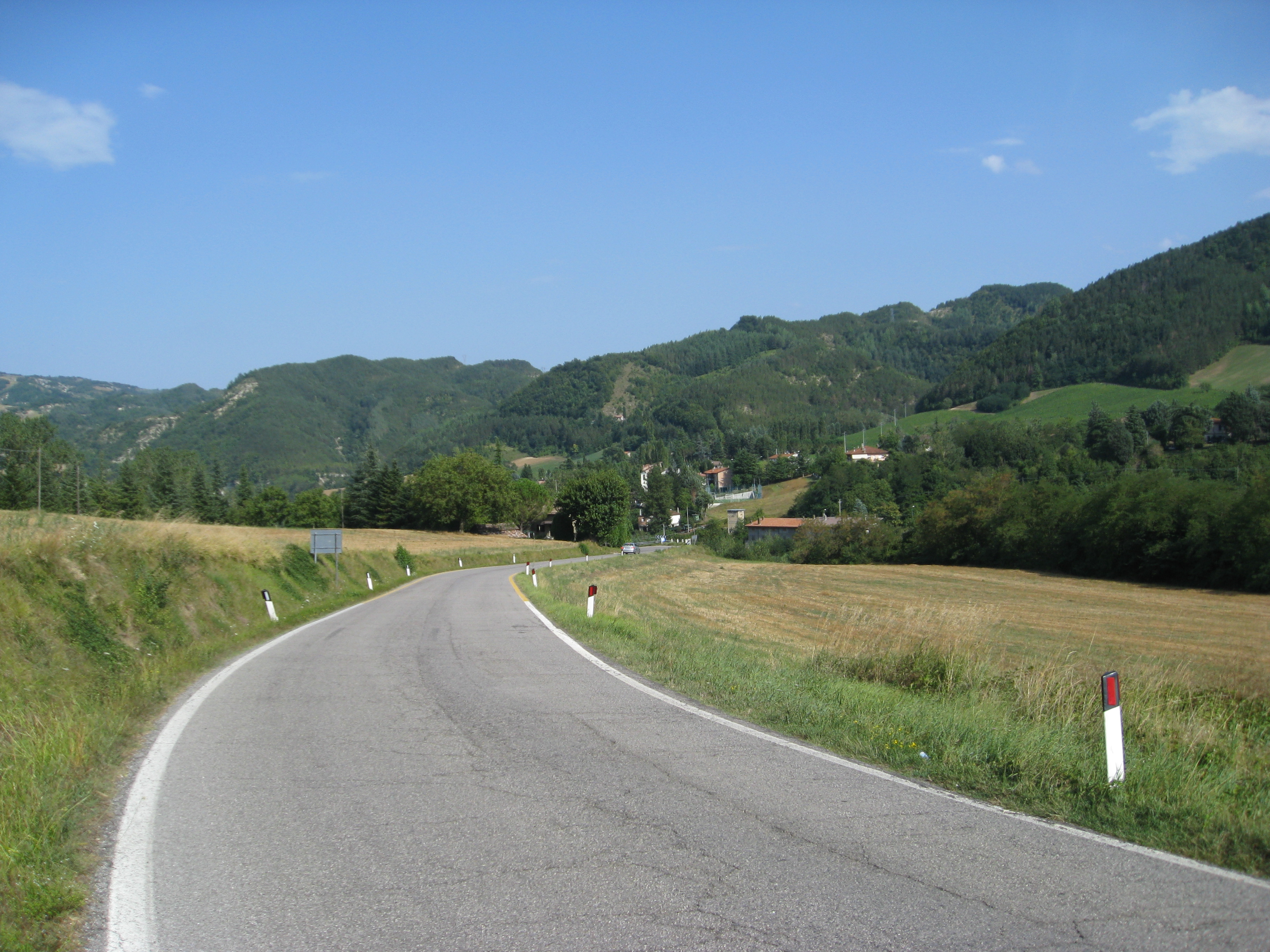 Perkele, propria, Strada statale 9 ter del Rabbi, libera